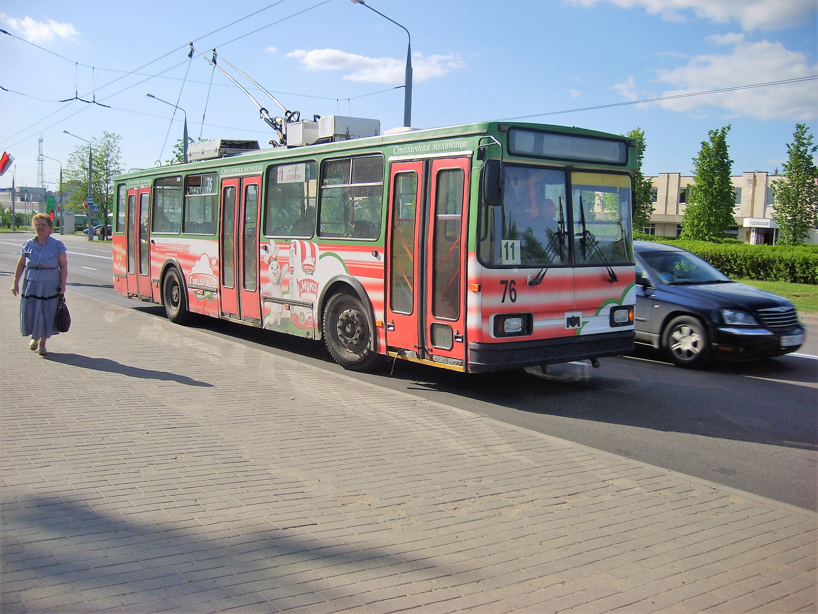 Троллейбус в Гродно